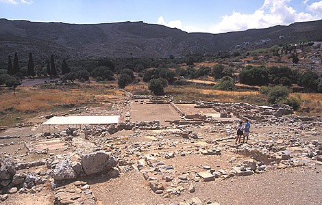 Minoischer Palast Káto Zákros - Ostkreta, Juli 1997